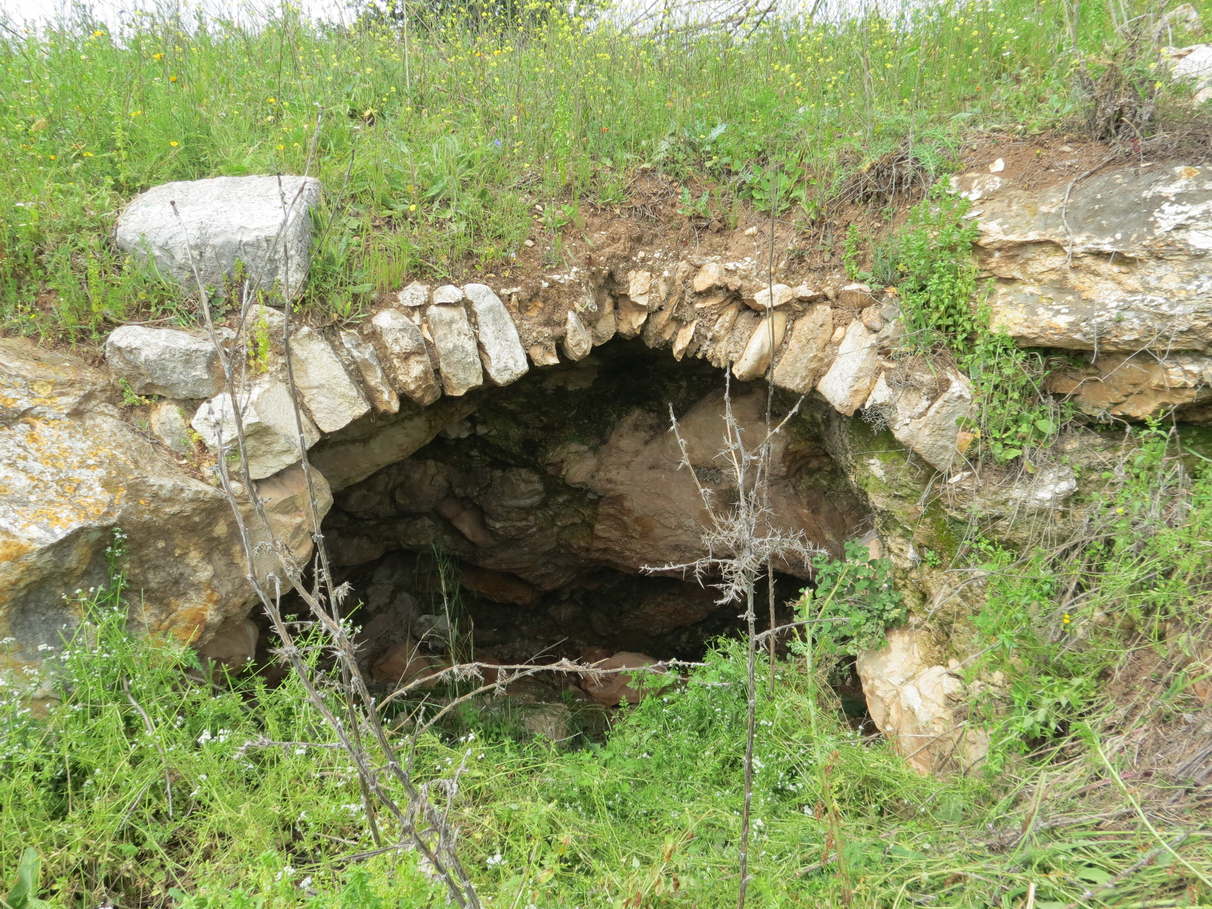 חורבת מחוז